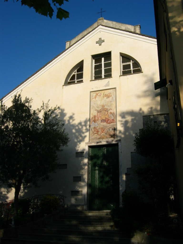 Chiesa parrocchiale di S. Desiderio in S. Desiderio, Borgoratti (Genova)